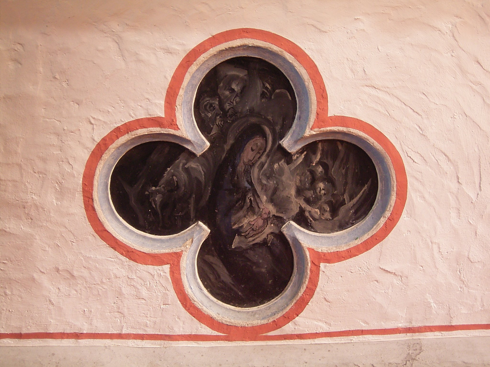 Sankt Gertrud in Morsbach